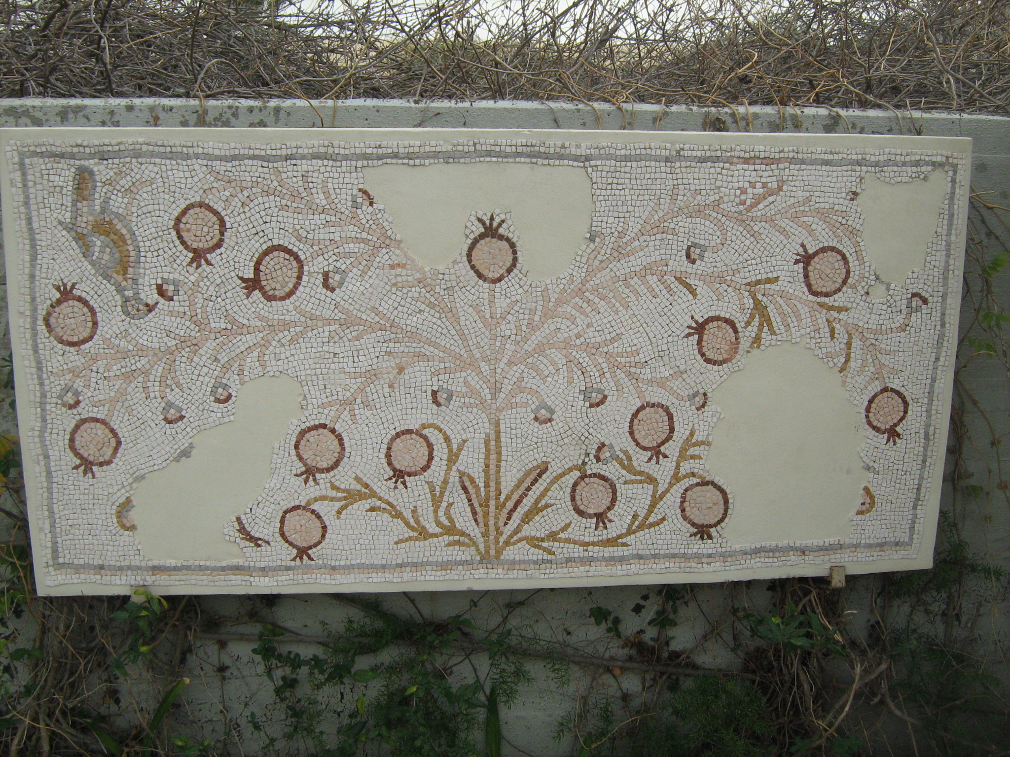 רצפת פסיפס מכנסייה בסוחמתא שבמוזיאון א"י